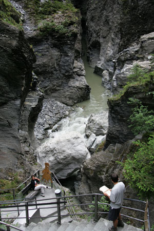 Viamala-Schlucht bei Thusis